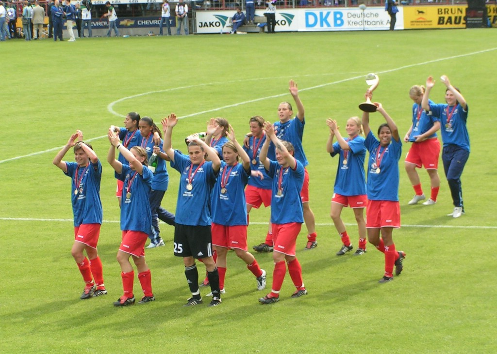 UEFA-Women's Cup Final 2005 at Potsdam: 1. FFC Turbine Potsdam - Djurgårdens IF / Älvsjö Stockholm at the Stadium "Karl-Liebknecht-Stadion" Source: Source: taken by David Herrmann, 21. May 2005